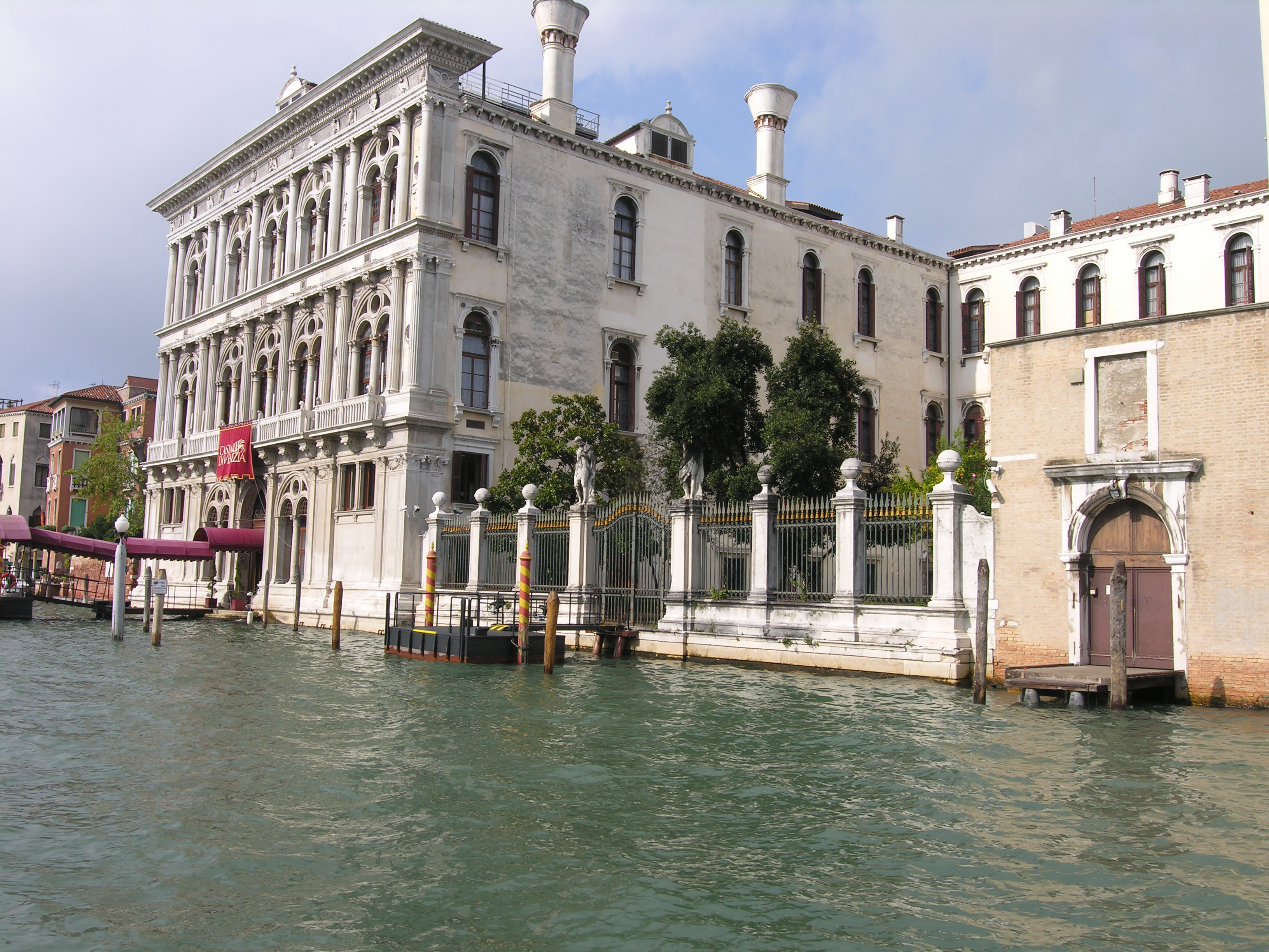 Venezia-Murano-Burano, Venezia, Italy